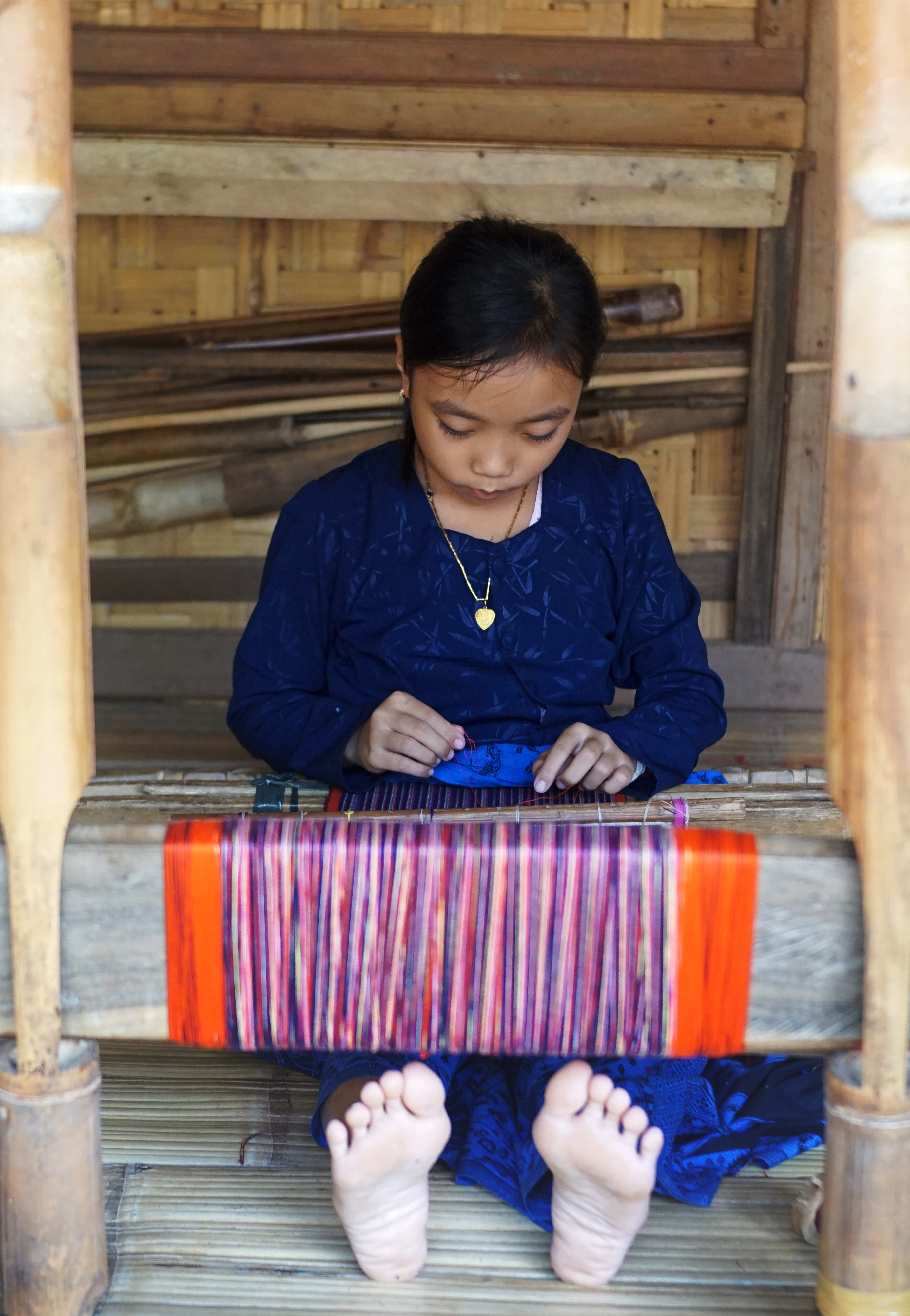 Delisa (10 tahun), seorang anak yang tinggal di Suku Baduy Luar, Banten, Indonesia. Sedang mengerjakan sebuah Tenun Baduy di depan rumahnya. Dengan teliti ia menyusun helai per helai benang hingga menjadi kain tenun yang nantinya akan dijual dengan harga mulai dari Rp 25.000 - Rp 150.000. Anak-anak di Suku Baduy (Baduy Luar & Baduy Dalam) memang tidak diperkenalkan dengan pendidikan formal. Mereka hanya diajari untuk dapat bercocok tanam dan membuat kerajinan khas Suku Baduy (salah satunya kain tenun Baduy).